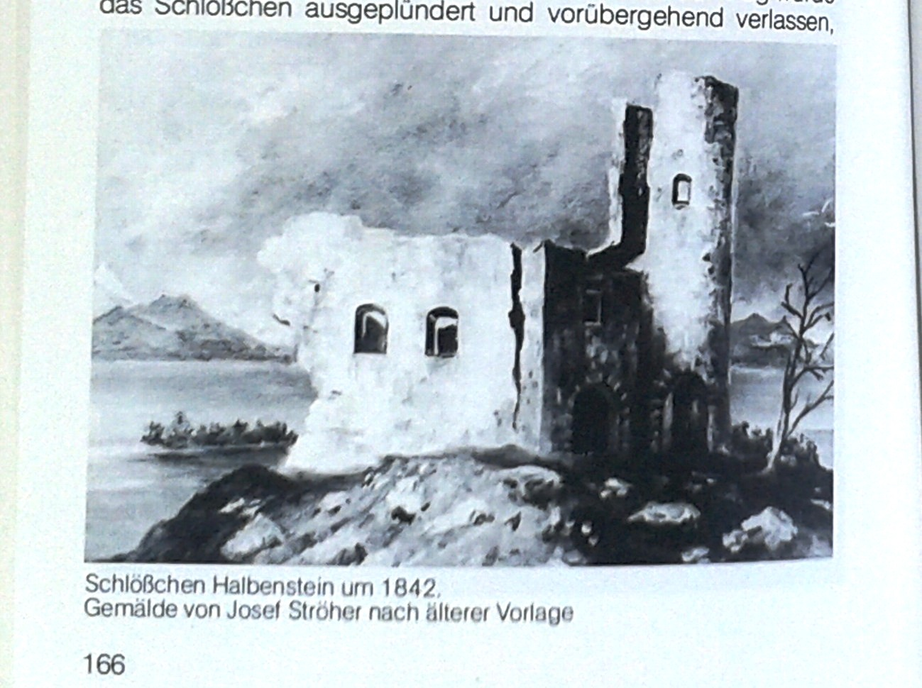 Ölgemälde der Ruine Halbenstein 1842 von Josef Ströher aus Hubers Burgenbuch, S 122 nach älterer Vorlage